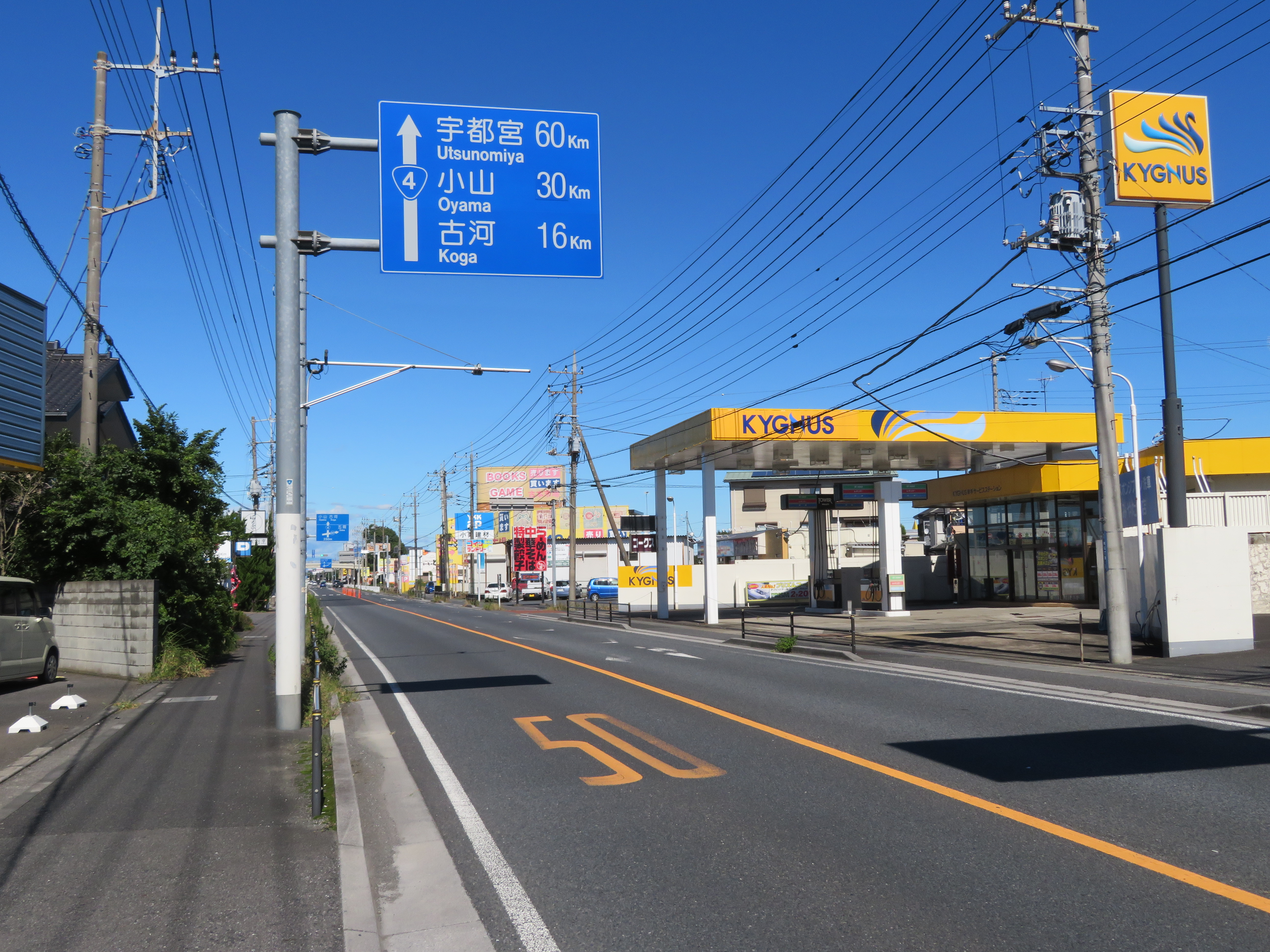 国道4号線埼玉県幸手市北２丁目付近（古河方面を撮影）